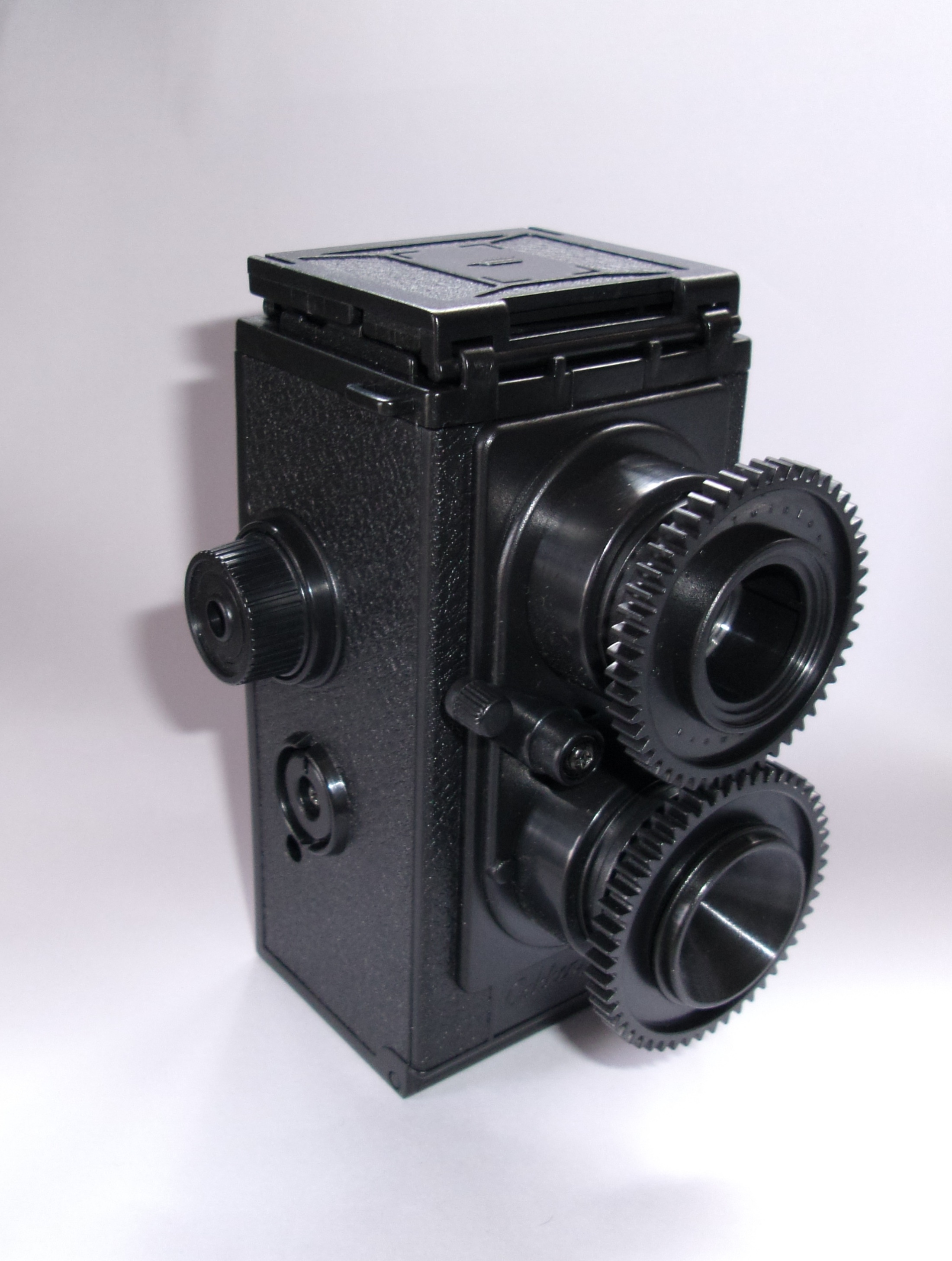 学研『大人の科学』25号の二眼レフカメラ